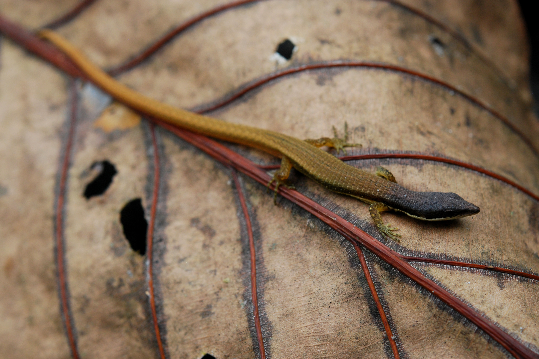 Cercosaura oshaughnessyi